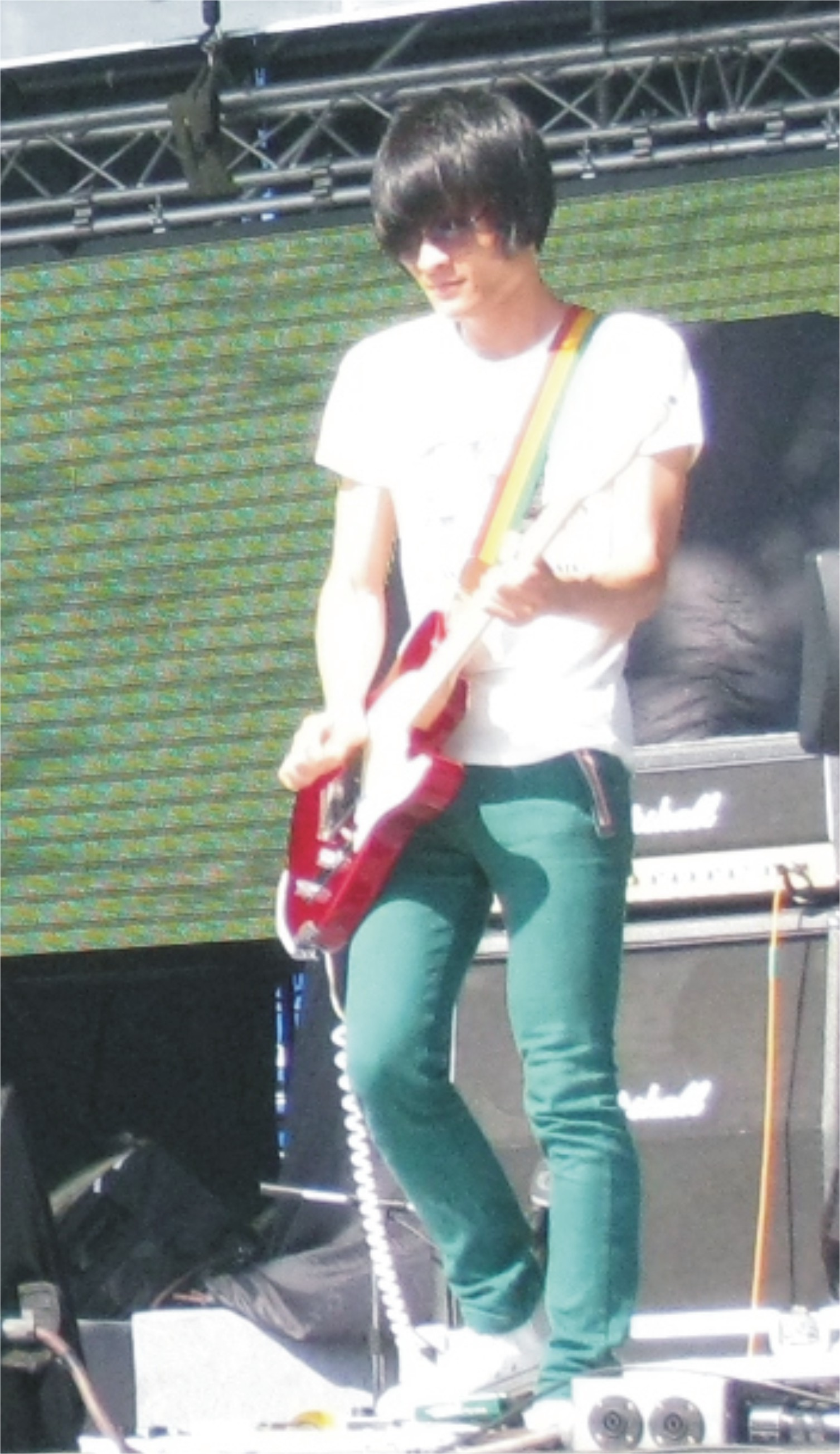 1976樂團吉他手張崇偉(大麻)，2009年於桃園縣立體育場「Music Terminals 2009 音樂航空站」音樂祭。